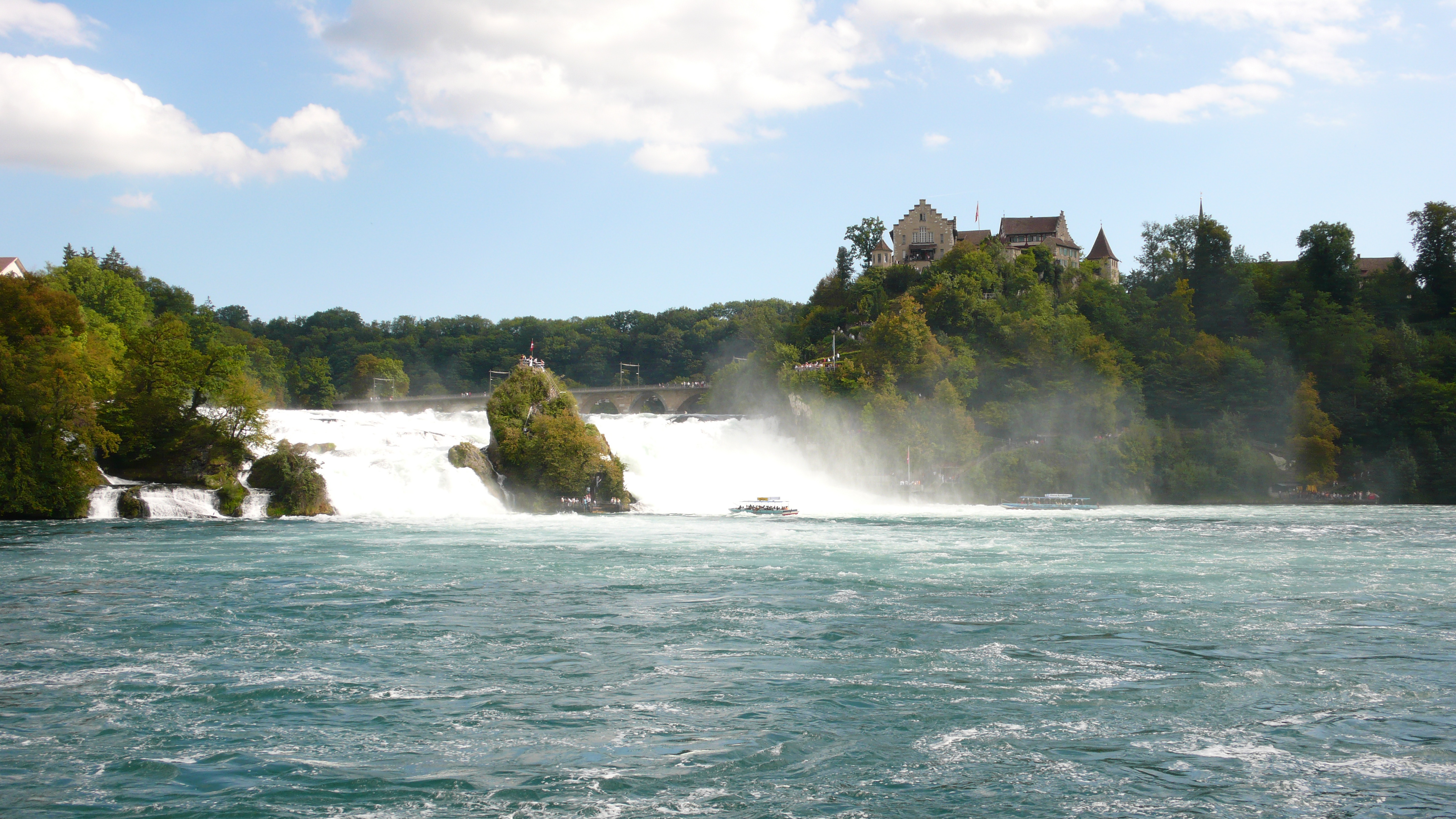 Beschreibung: Der Rheinfall bei Schaffhausen von oben Quelle: selbst aufgenommen Fotograf: --Satmap 19:50, 8 September 2007 (UTC) Description: The Rhine Falls near Schaffhausen Source: photo was taken by my self Photographer:--Satmap 21:29, 8 September 2007 (UTC) Licence: GNU FDL